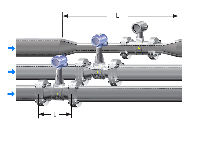 Vergleich Einlaufstrecken von 1970 bis 2008